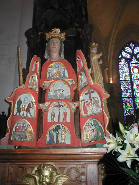 Chapelle Notre-Dame-de-Quelven, Guern, Morbihan (France). Statue dite Notre-Dame-de-Quelven, sculpture en bois doré (XVIe siècle). Vierge à l'enfant avec deux panneaux ouvrants